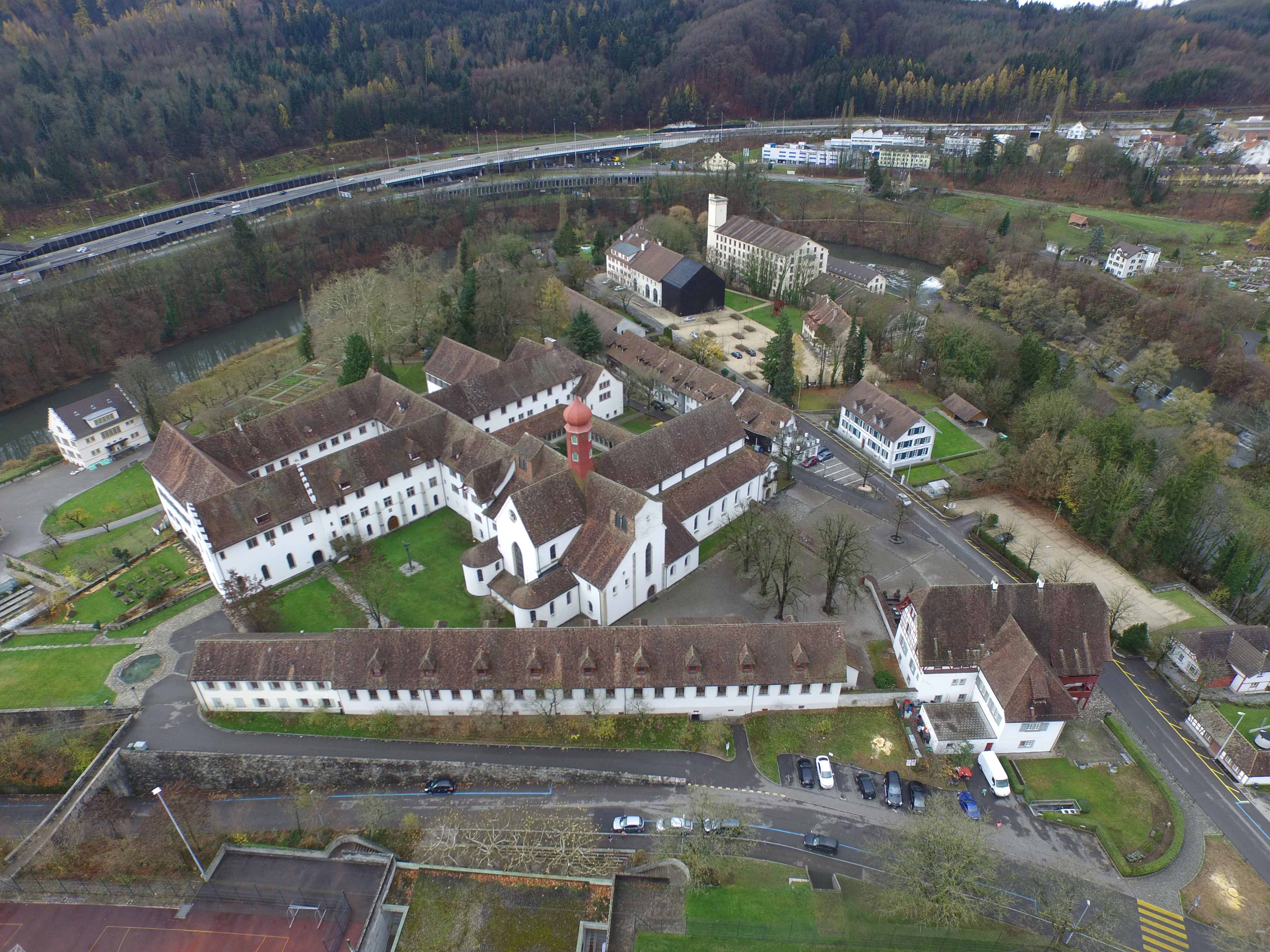 Blick auf das Kloster Wettingen